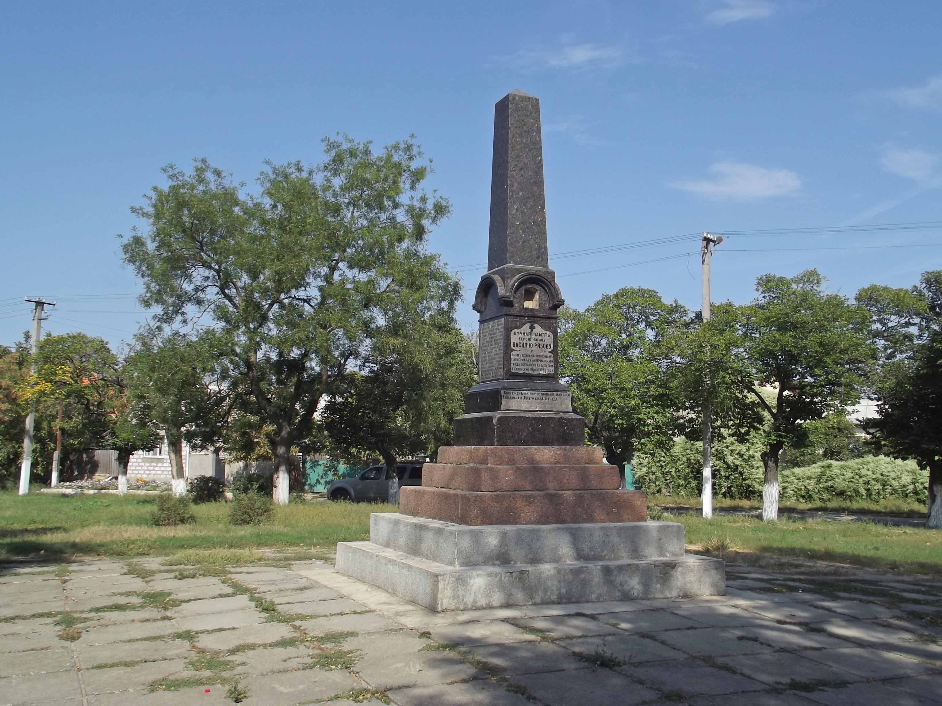 Памятник Василию Рябову